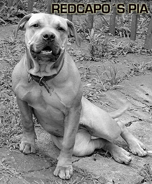 Redcapo's Pia, exemplar típica da raça Bull-mastiff brasileiro.